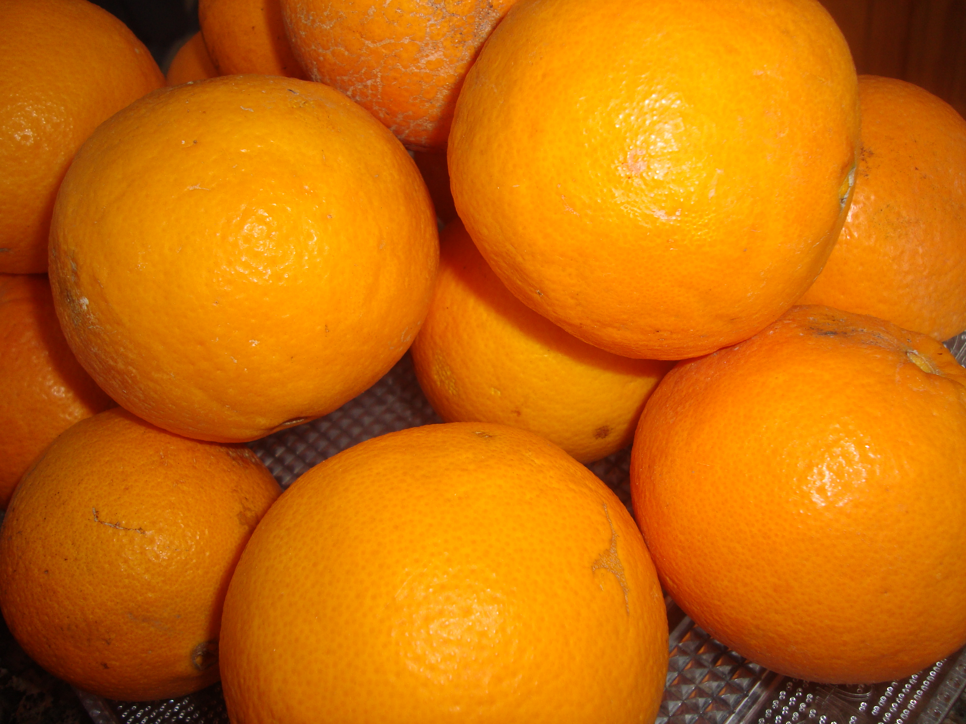 Naranjas